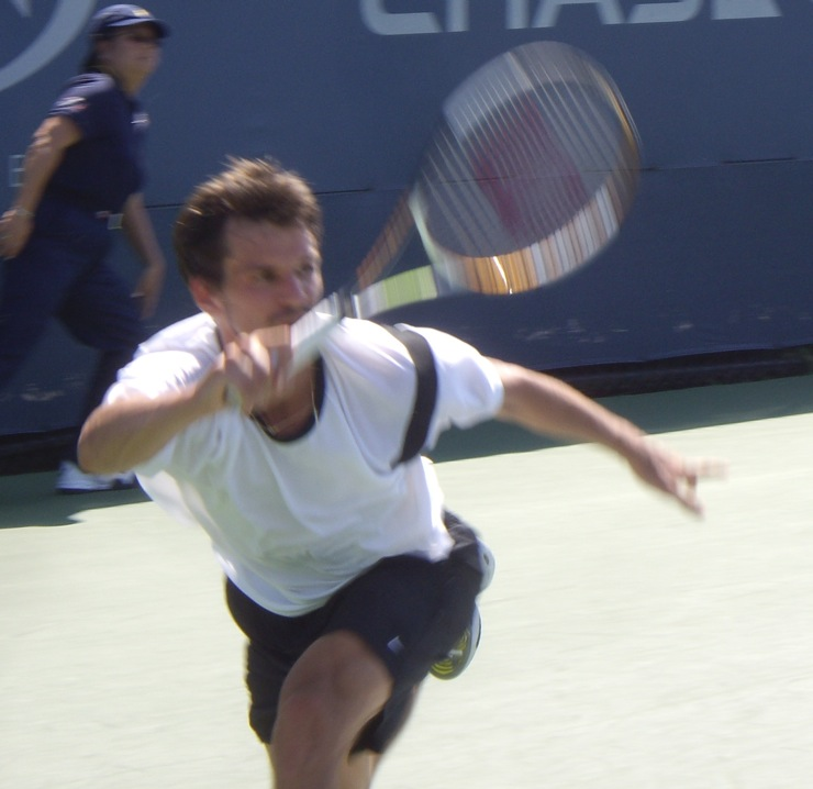 Philipp Petzschner at usopen 2007